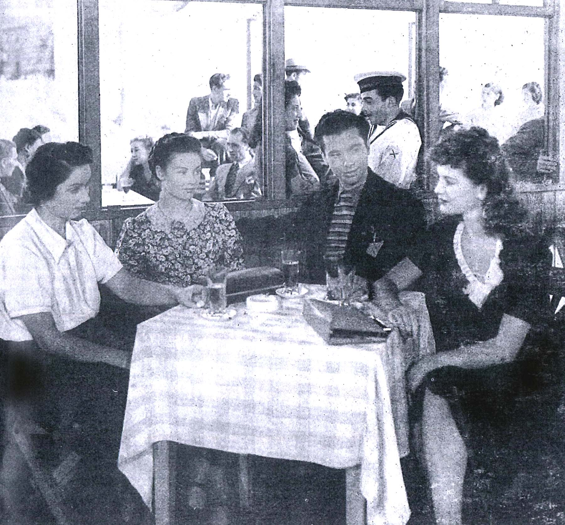 Dhia Cristiani, Maria Denis, Elio Marcuzzo e Jone Salinas in "Sissignora" (Poggioli, 1941)